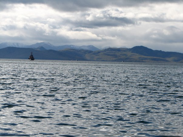 Авачинская бухта